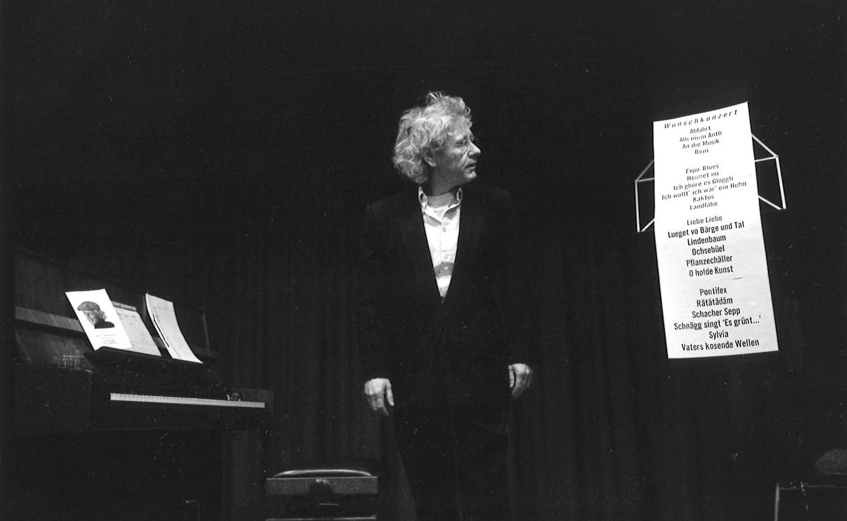 Osy Zimmermann (*1946) Schweizer Sänger, Musiker, Schauspieler